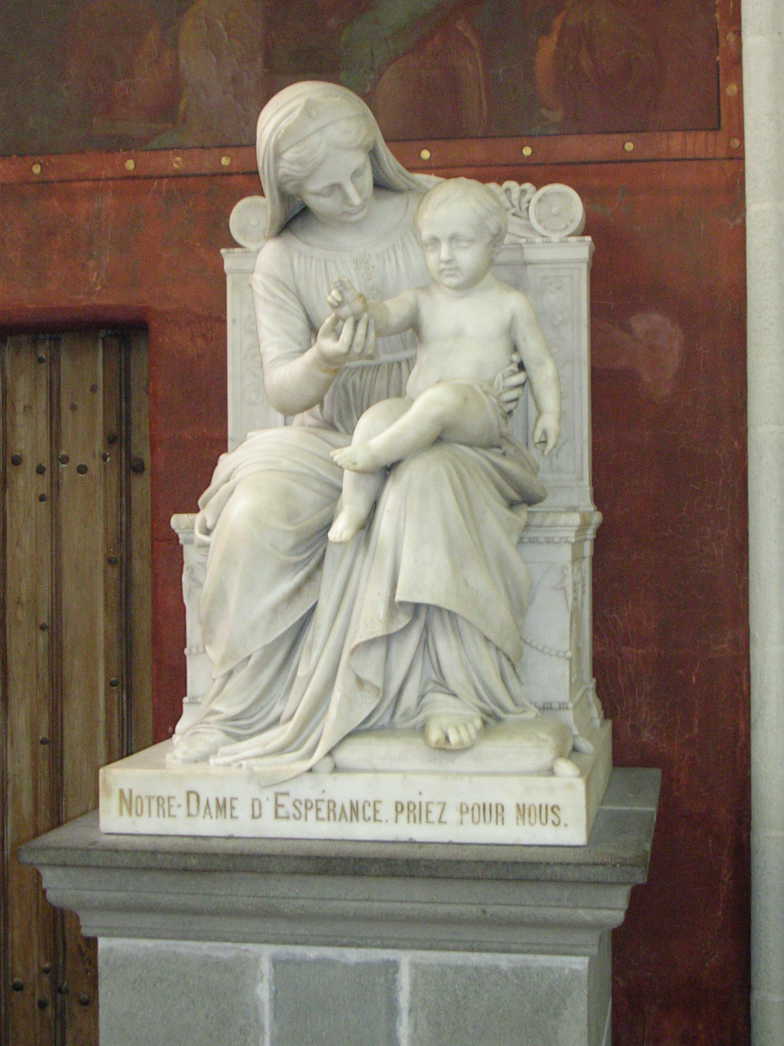 Cathédrale Saint-Corentin de Quimper. Statue en marbre de la Vierge à l'Enfant par Auguste-Louis-Marie Ottin, 1846.